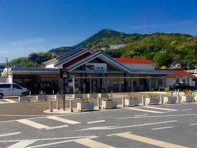 2016年撮影の熊野市駅舎